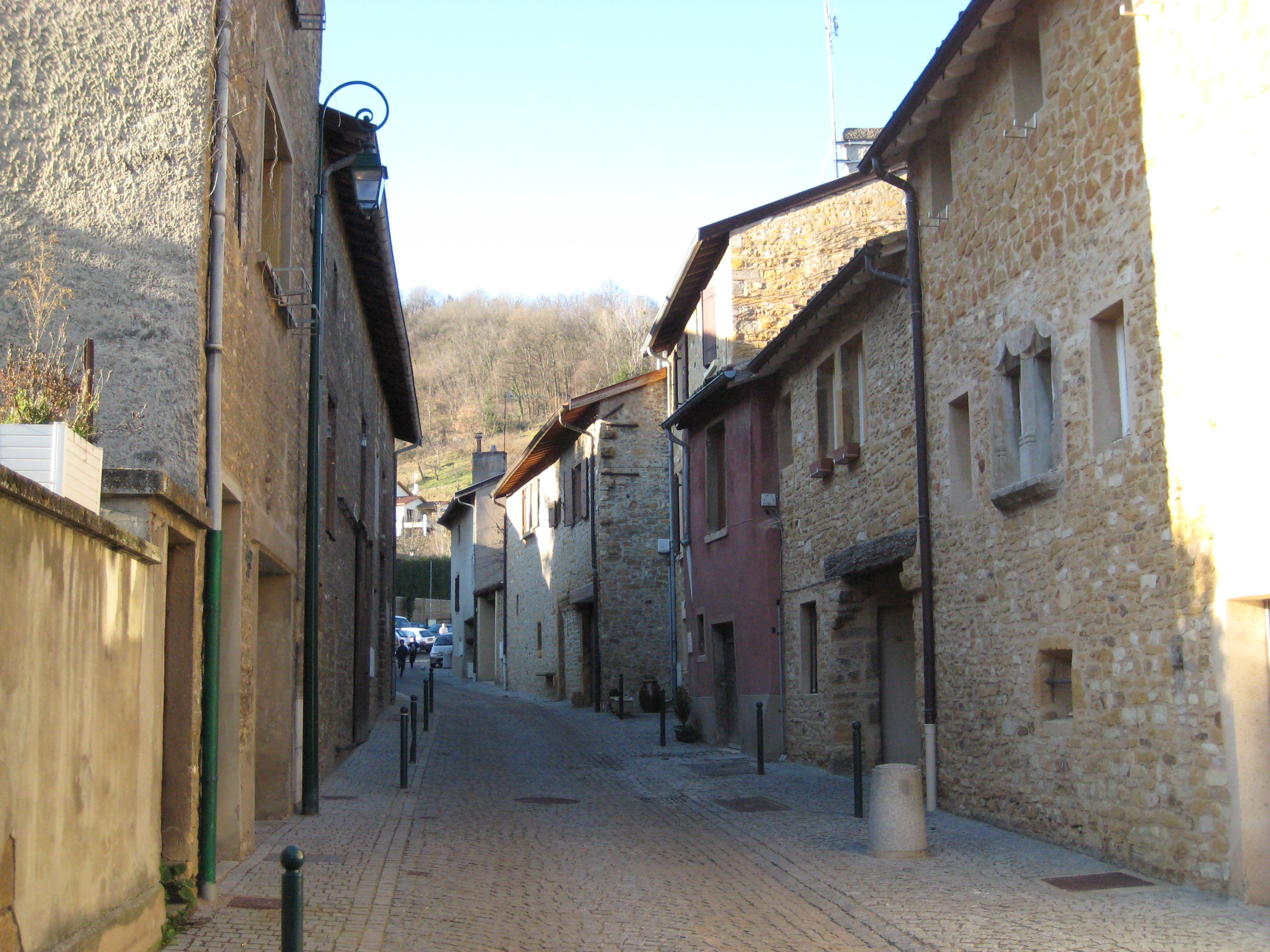 Rue de Saint-Romain au Mont d'Or